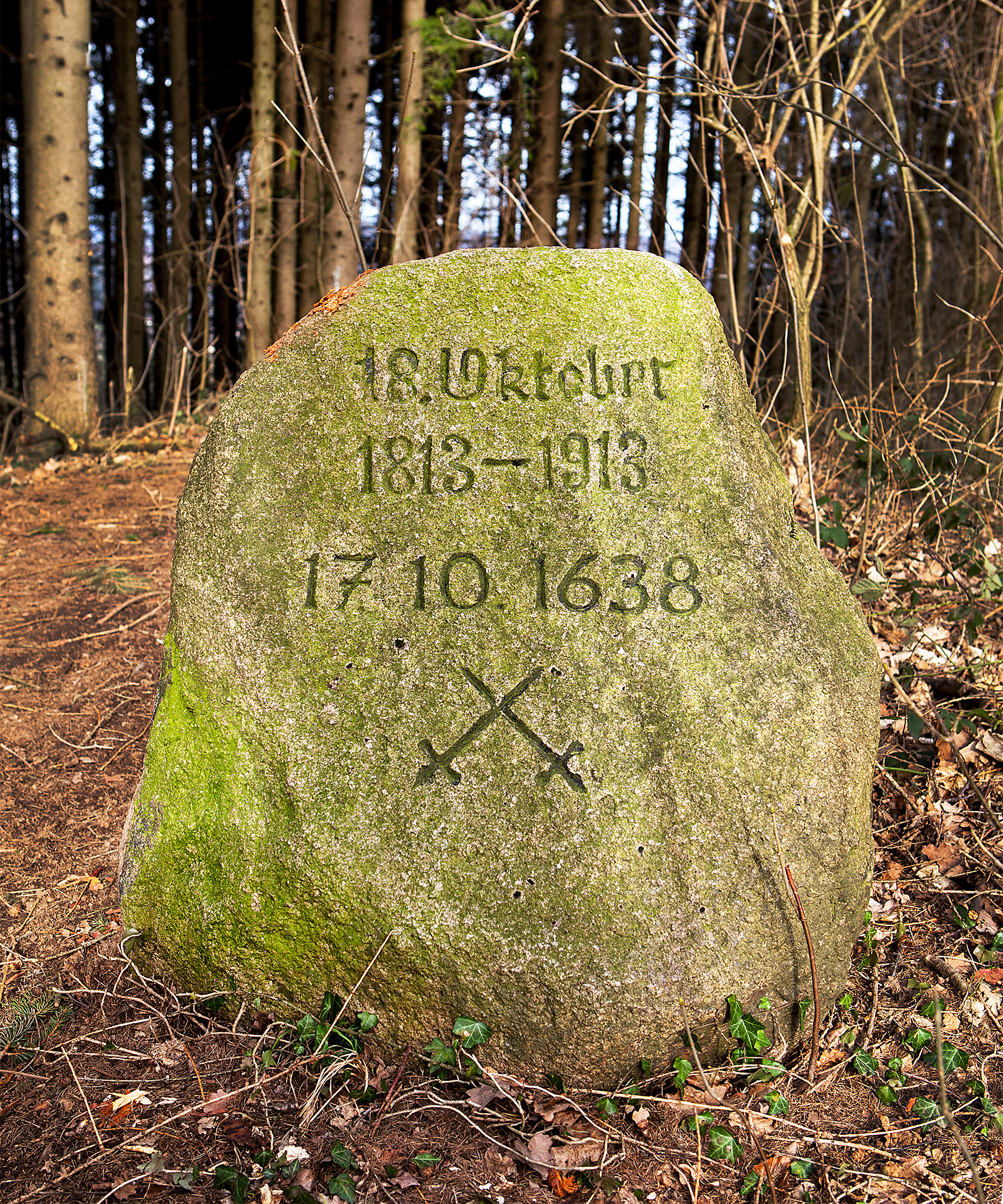 Gedenkstein auf dem Eiberg in Vlotho (Valdorf) zur Erinnerung an die Völkerschlacht bei Leipzig (18. Oktober 1813) und die Schlacht bei Vlotho (17.10.1638)